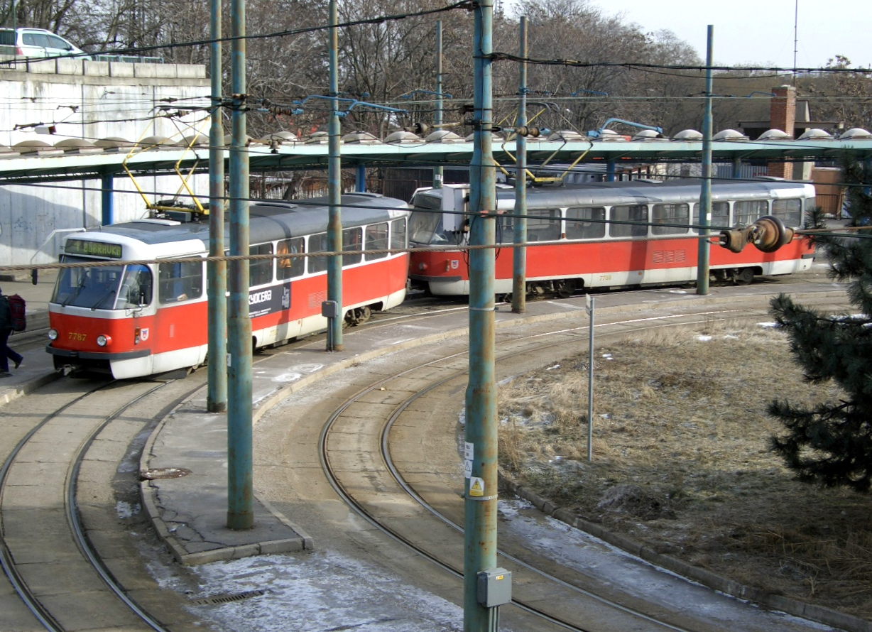 Trams in Bratislava, Slovakia